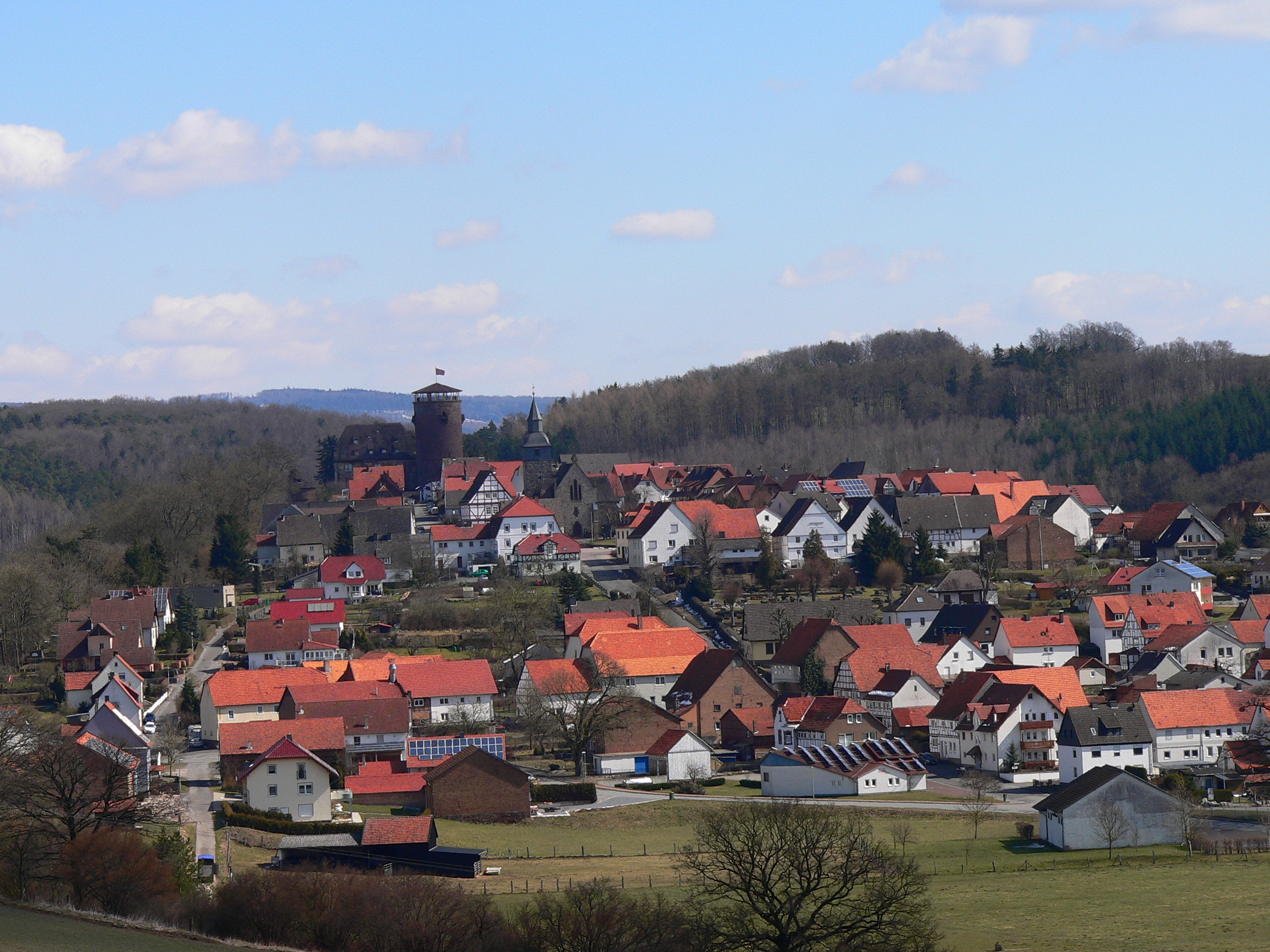 Tendelburg in Hessen (Ortsansicht), Regierungsbezirk Kassel, Landkreis Kassel